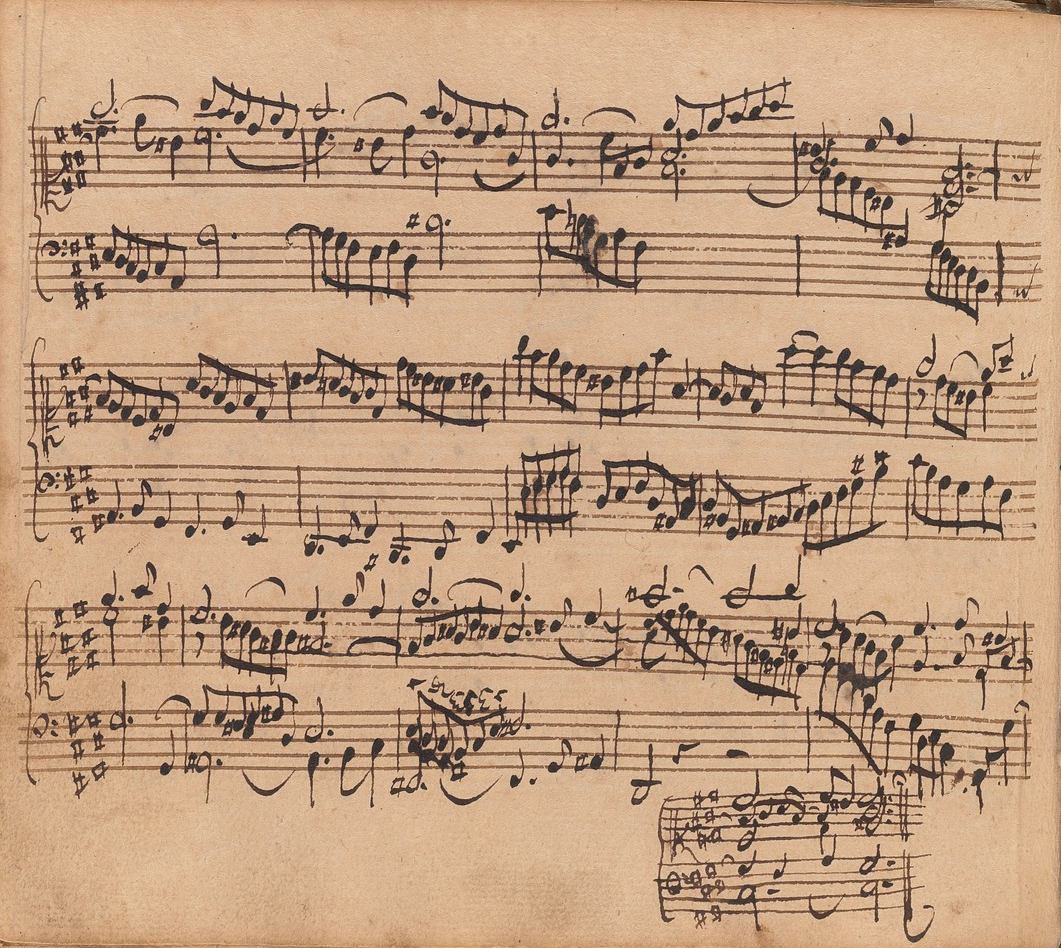 La dernière page du prélude ut-dièse mineur (BWV 849) dans la version du Clavierbüchlein pour Wilhelm Friedemann Bach (1720) no. 22.